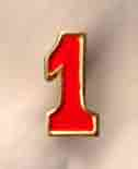 Badge for the referendum on pension systems in Sweden 1957